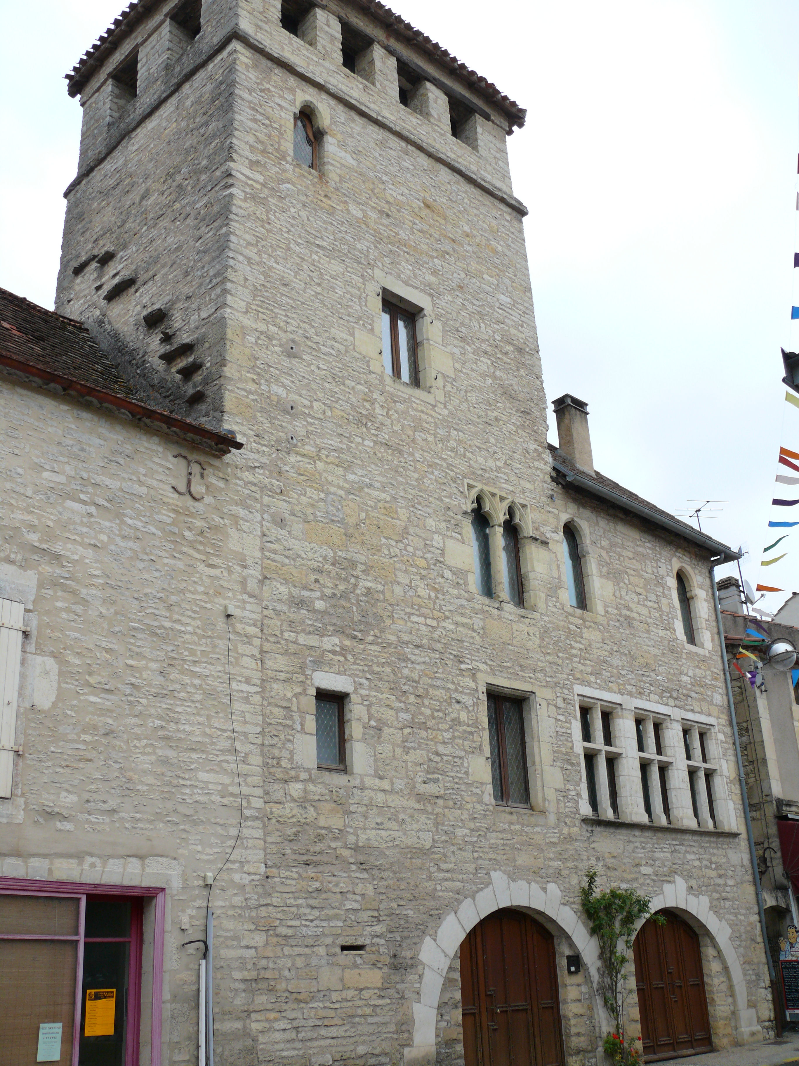 Catus - Maison Dépérat